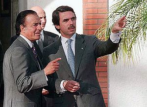 JEFE DE GOBIERNO DE ESPAŅA, JOSE MARIA AZNAR fue recibido por el PRESIDENTE DE LA REPUBLICA ARGENTINA, DR. CARLOS SAUL MENEM